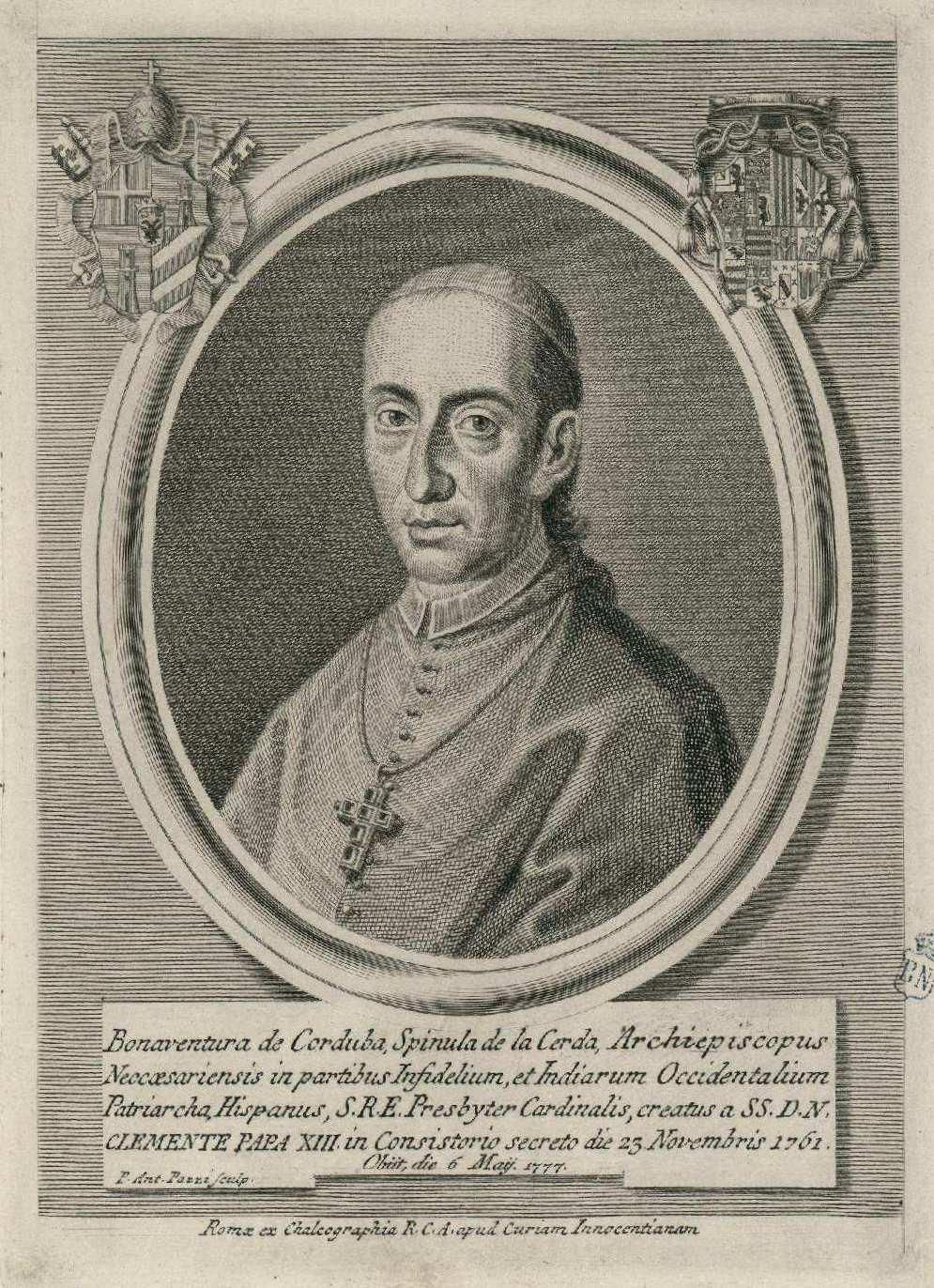 Retrato de Buenaventura Fernández de Córdoba y Spínola (1724-1777); grabado calcográfico de Pietro Antonio Pazzi, Calcografía Camerale Romana.